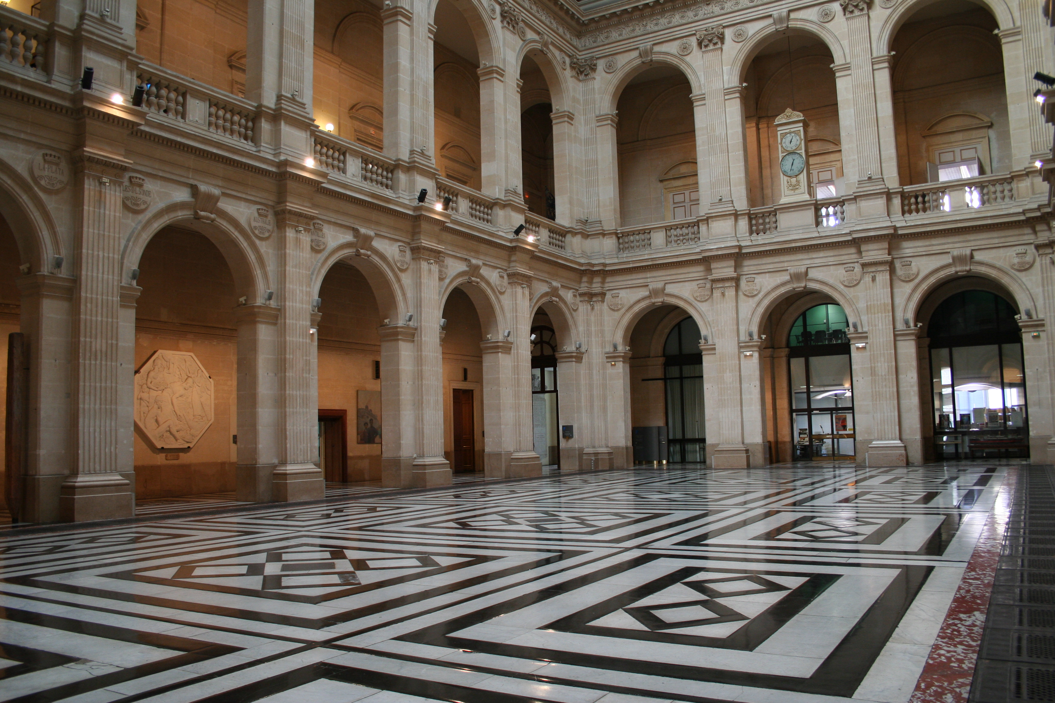 Palais de la Bourse à Marseille, intérieur avec baromètre.